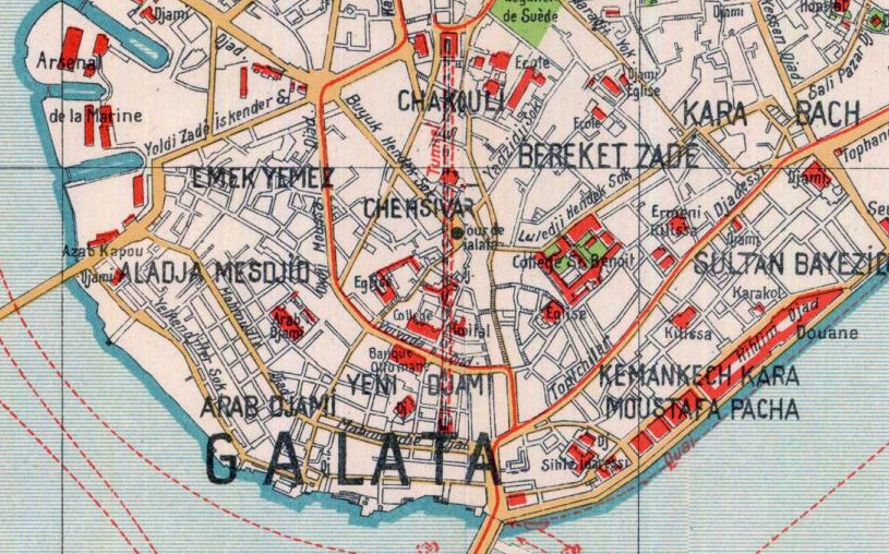 Map of Galata in 1922 Extracted from Plan d'Istanbul par la Société Anonyme Ottomane d'Etudes et d'Enterprises Urbaines, 1922